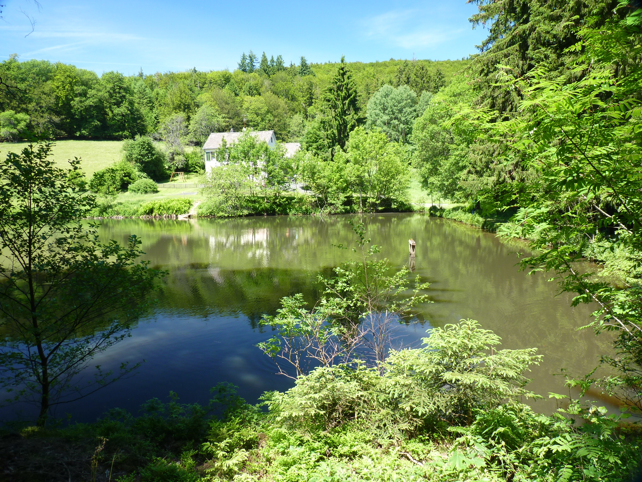 Oberer Dietzhölzweiher mit Forsthaus Dietzhölze im Hintergrund